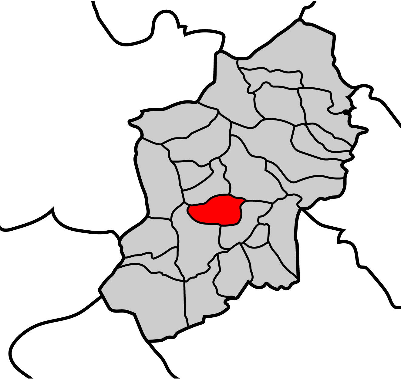 Mapa de la parroquia de Becerreá ayuntamiento de Becerreá